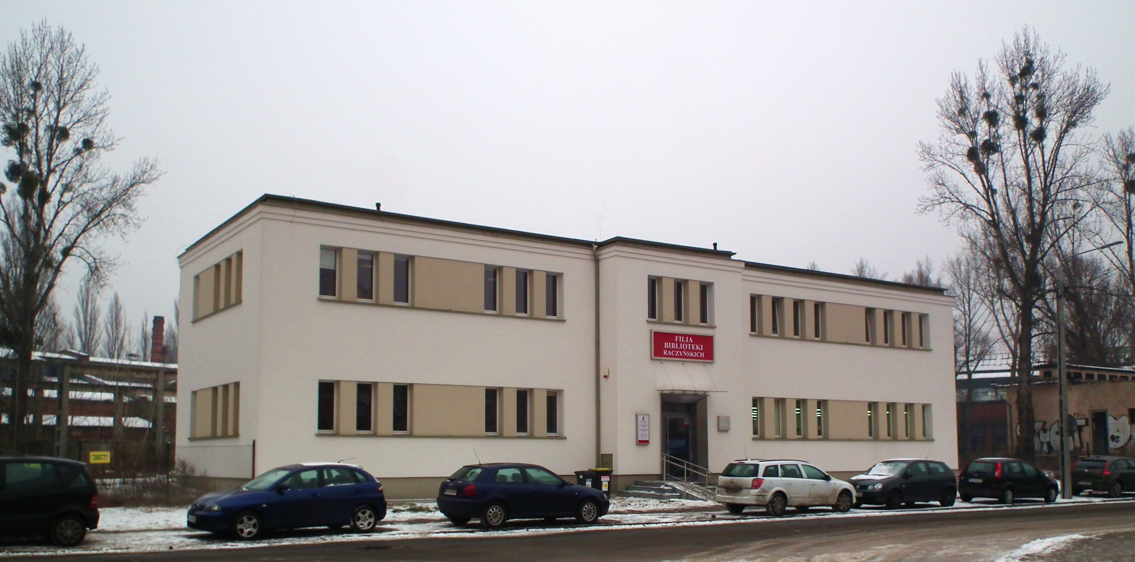 Filia Biblioteki Raczyńskich na ul. Roboczej na Wildzie w Poznaniu.